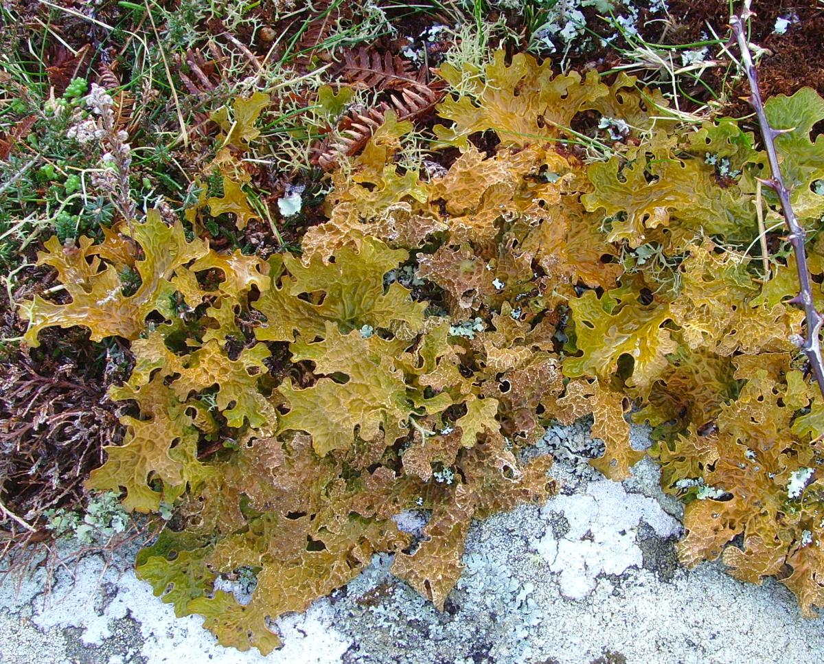 Lobaria pulmonaria, thalle sec, pointe du Raz (Plogoff, Finistère, Bretagne, France)